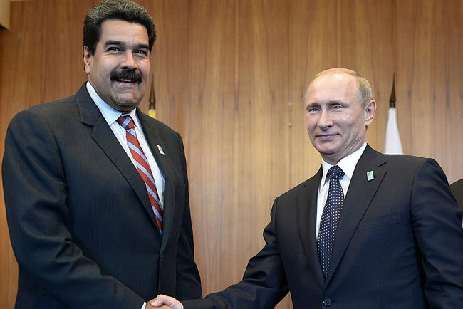 Встреча с Президентом Венесуэлы Николасом Мадуро